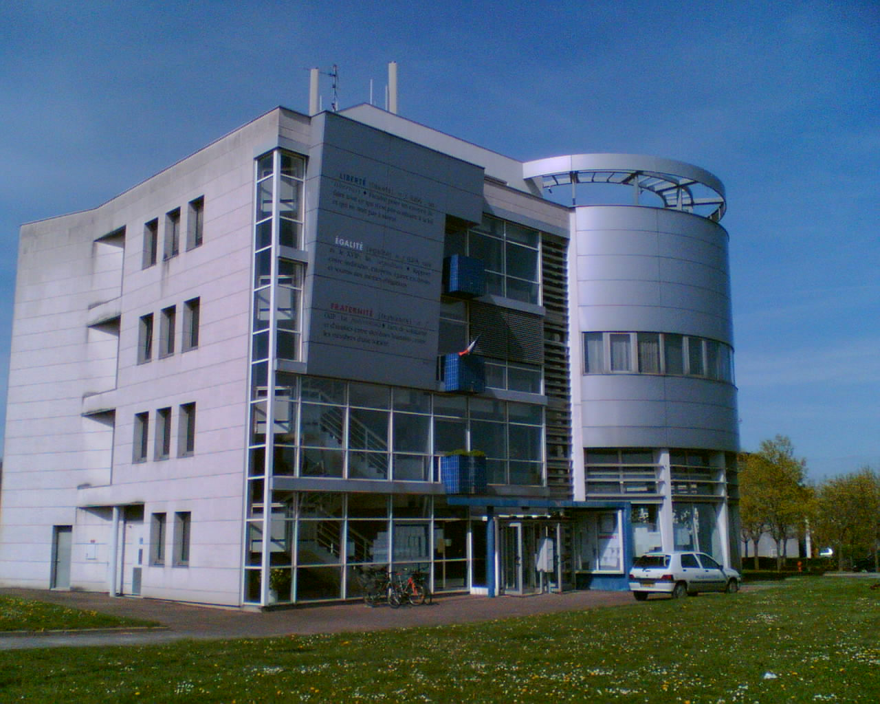 Mairie de Saint-Rémy (Saône-et-Loire)